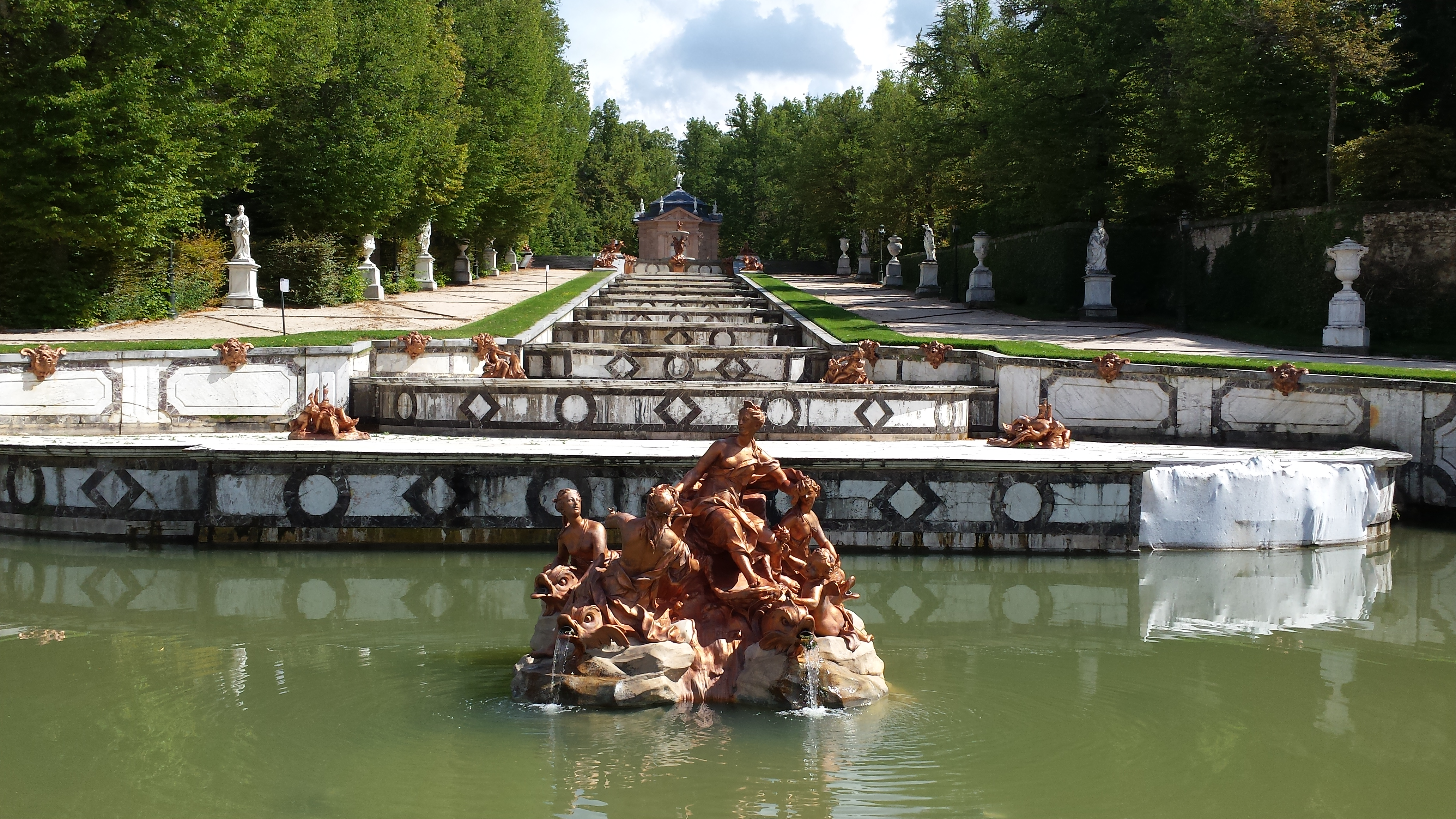 Kaskadenbrunnen im Park La Granja San Ildefonso (nah)